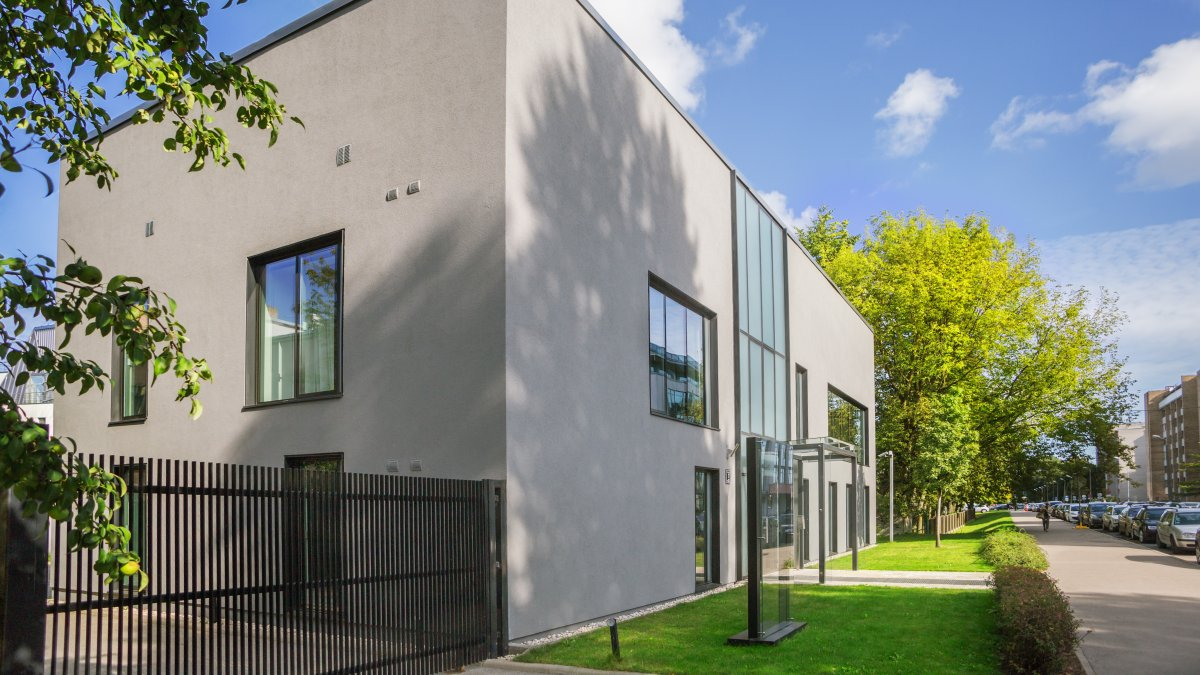 Sporta rezidence